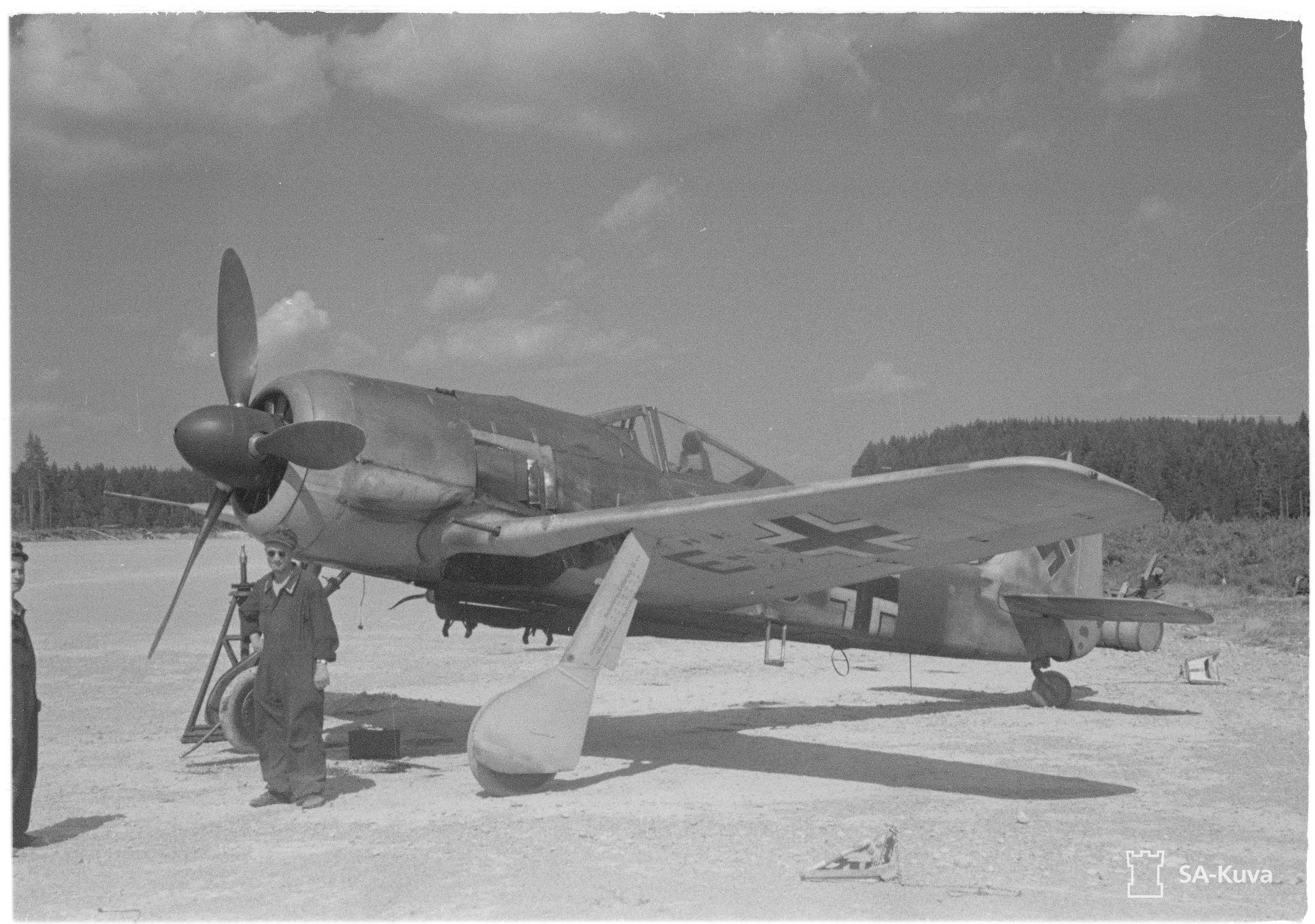 Focke Wulf Jabo hävittäjä- ja pommittajakone. (Kuvassa 1./SG 5:n Focke-Wulf Fw 190 F-8, musta 10). Kuvauspaikka: Immolan lentokenttä.